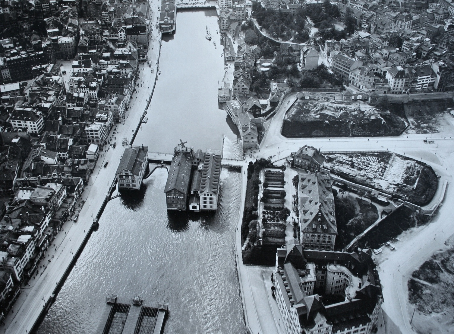 Zürcher Limmatraum nach Süden, 1909